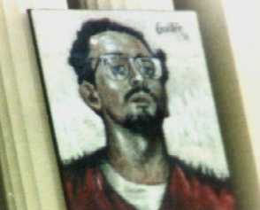 Cartel con la figura de Carlos Fonseca. Nicaragua, 1988.